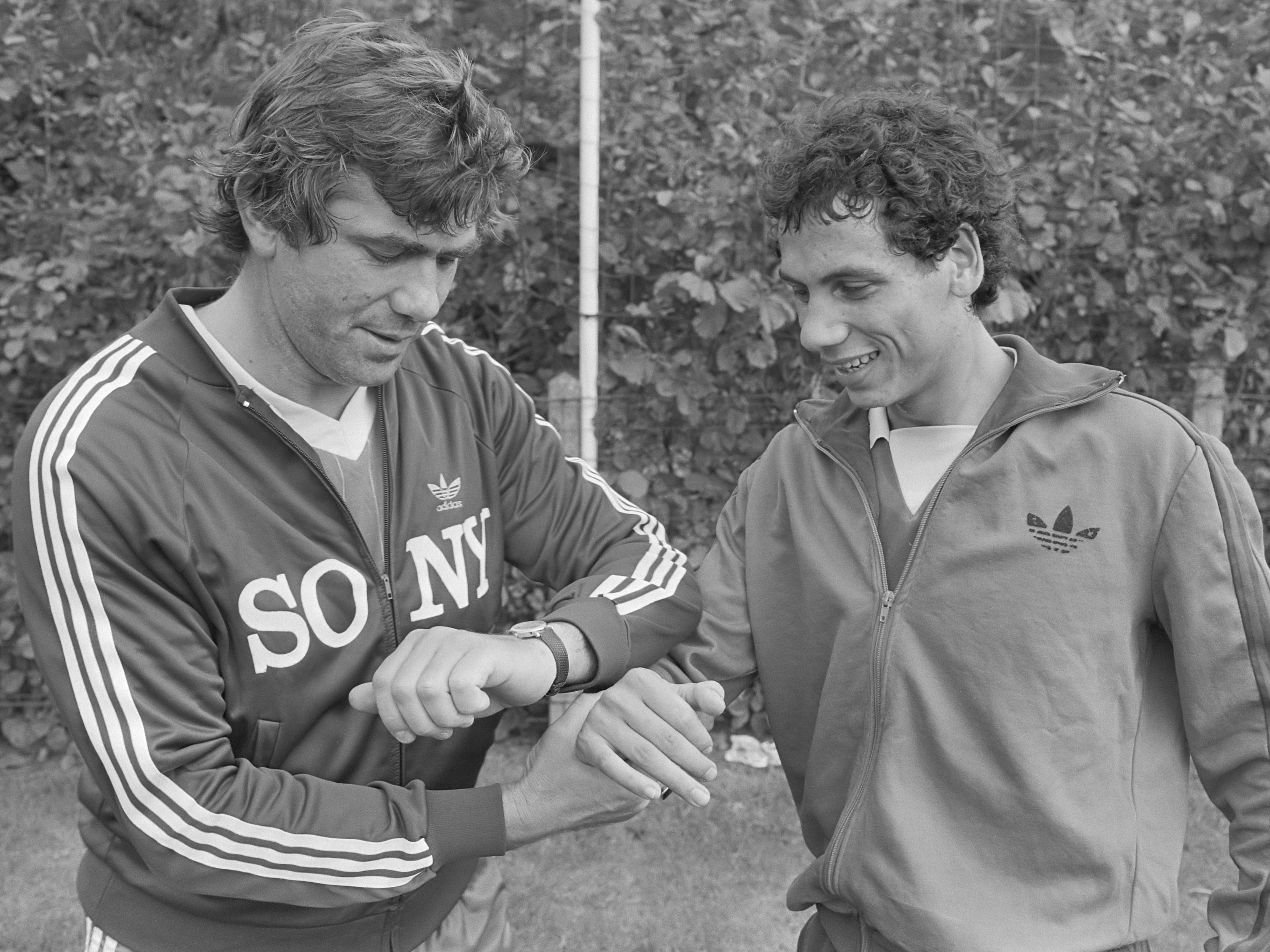 Training van AZ'67 voor de Europa Cup II wedstrijd tegen Inter Milaan. Trainer Hans Eykenbroek (l) neemt de polsslag op van Ricky Talan 19 oktober 1982